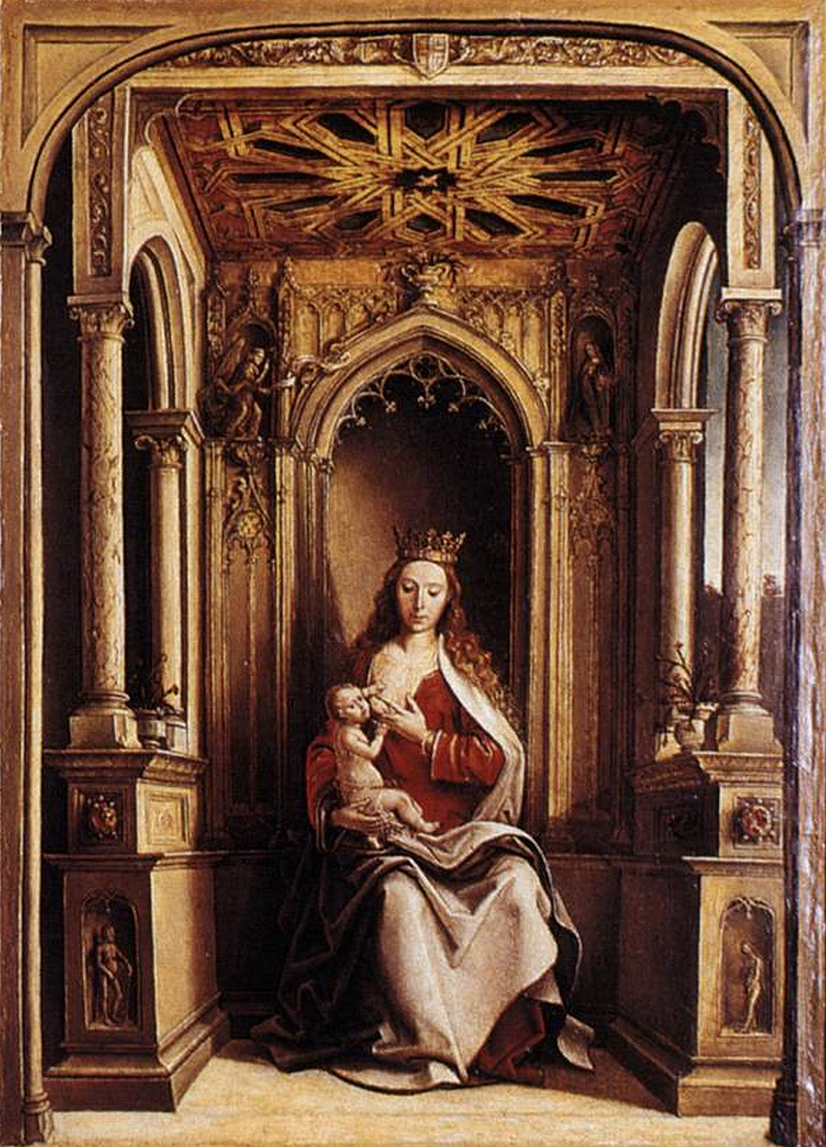 La obra representa a la Virgen María amamantando a su hijo, el Niño Jesús.